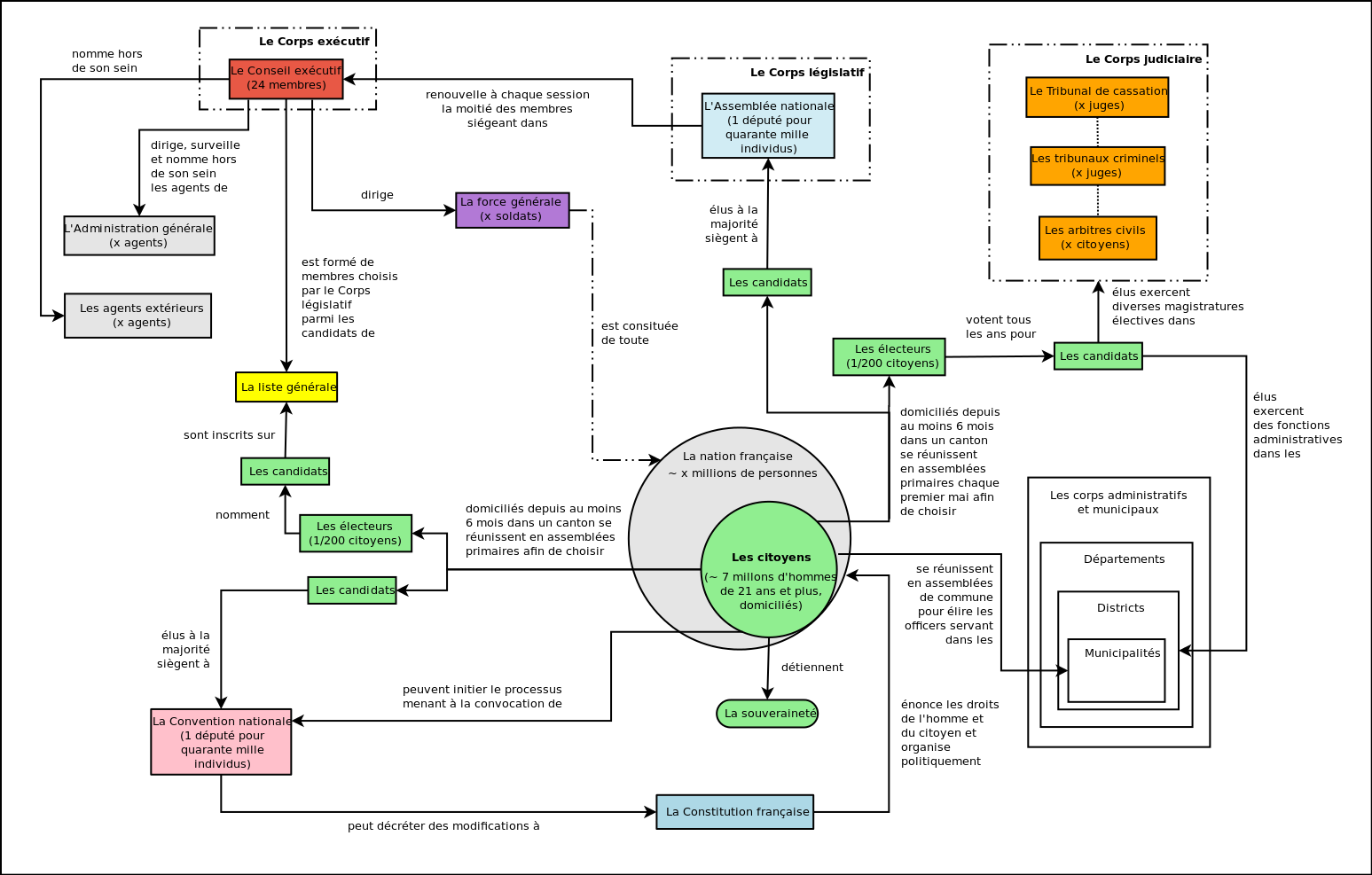 Constitution française du 24 juin 1793